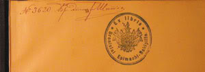 Экслібрыс Браніслава Эпімах-Шыпілы.